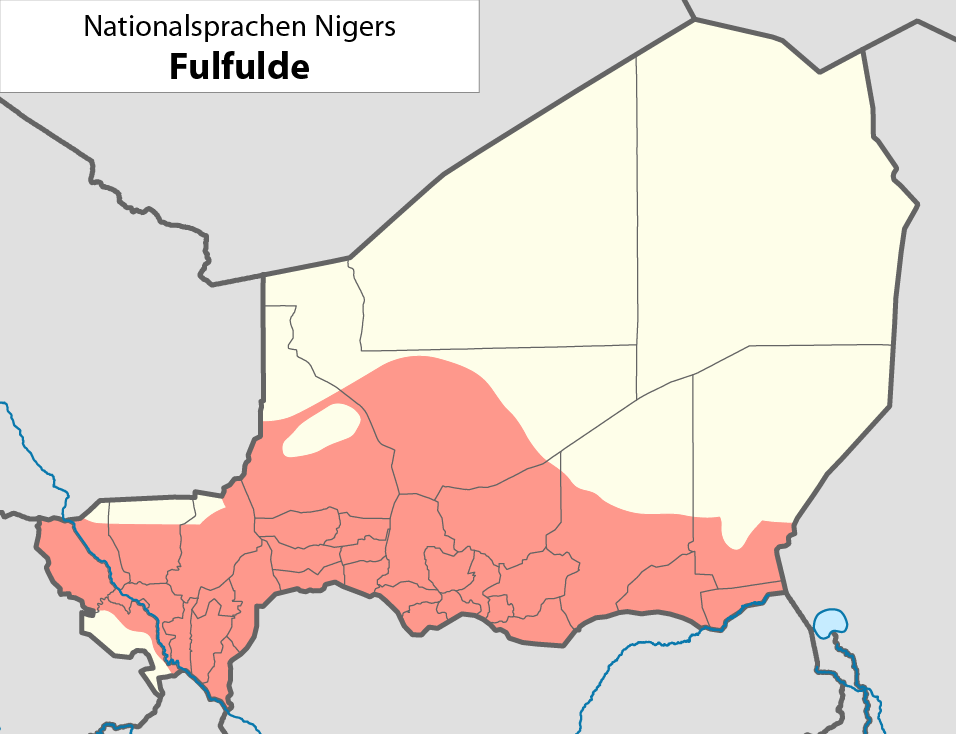 Nationalsprachen des NigerDie dargestellte Nationalsprache kann dem Dateinamen entnommen werden.